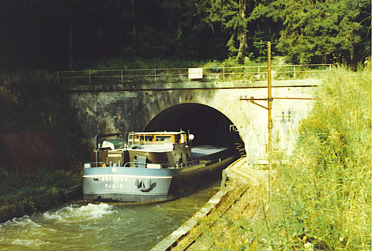 Tunnel ouest du Canal de la Marne au Rhin, près d'Arzviller